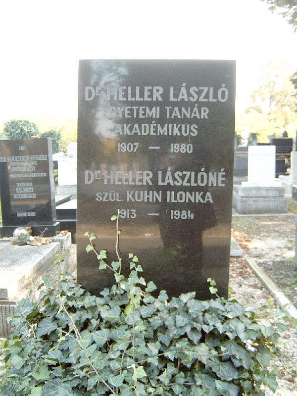 Heller László sírja Budapesten. Kozma utcai izraelita temető 5B-1-7.